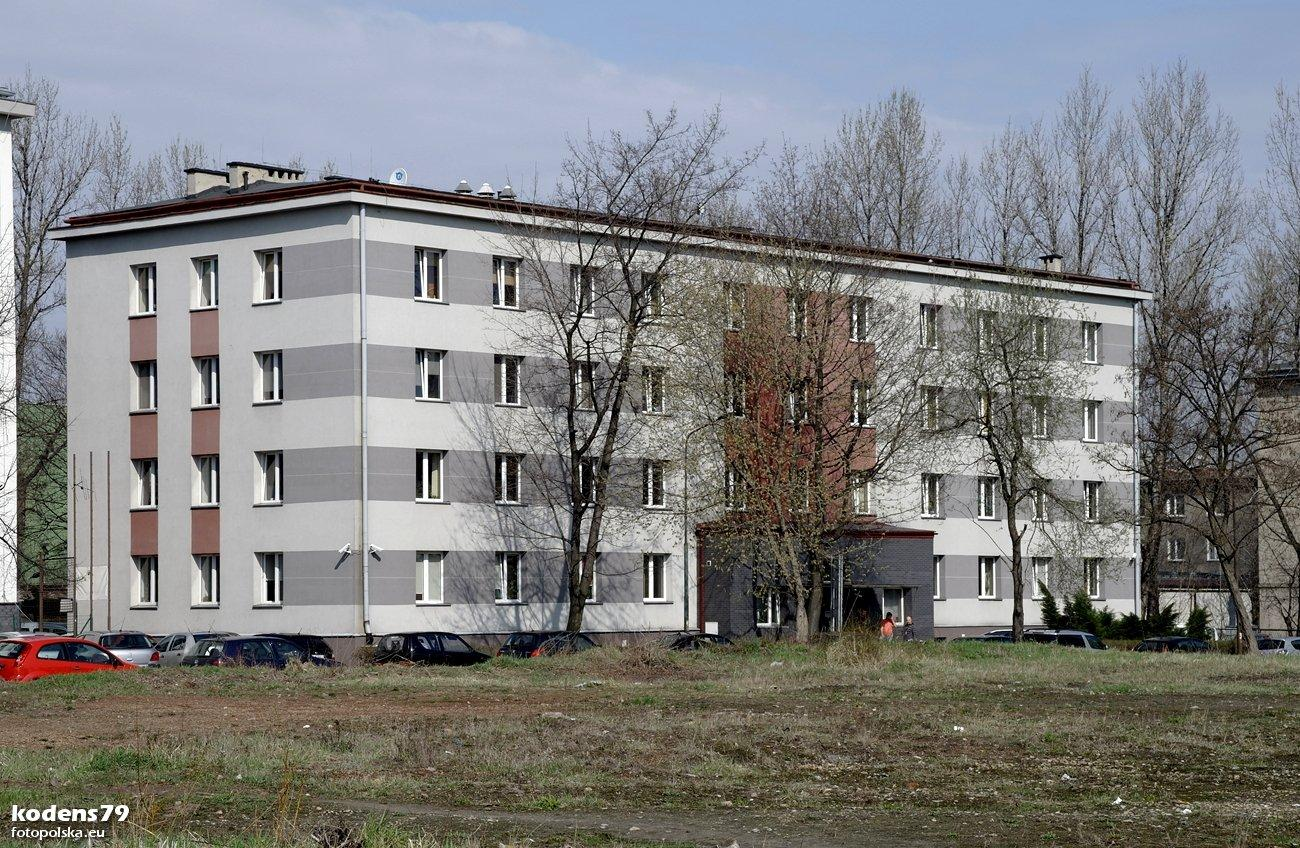 Ulica Wolnego Józefa 12 w Katowicach